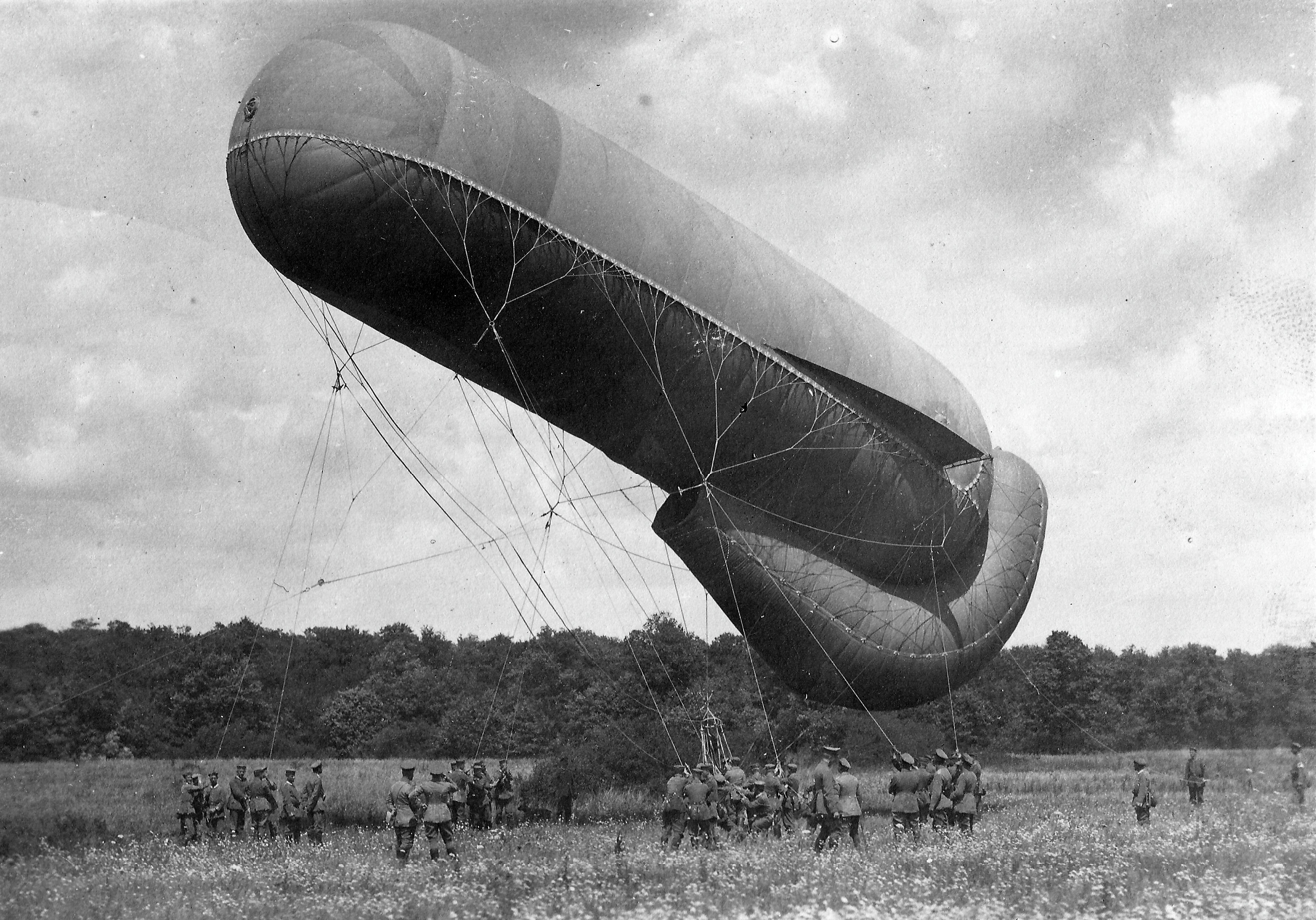 Fotos aus dem Album "Kriegserinnerungen" von Max Kranz 4 Fotos: Fesselballon, mit dem Beobachter der Artillerie aufstiegen. Im Sommer 1915 machte Max Kranz, Reserveleutnant der Artillerie, Weingutsbesitzer und Kalkbrenner aus Hatzenport an der Mosel, damals 26 Jahre alt, Großvater des Einreichers, eine Fahrt mit dem Ballon zur Artilleriebeobachtung , wovon die eingereichten Fotos zeugen. Einsatzort war eine Wiese bei Parfondrupt, einem kleinen Dorf in Lothringen.